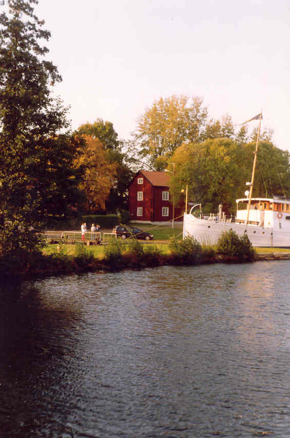 Dockan vid Göta kanal - Motala verkstad, hösten 1992. Ett fotografi av Harri Blomberg.